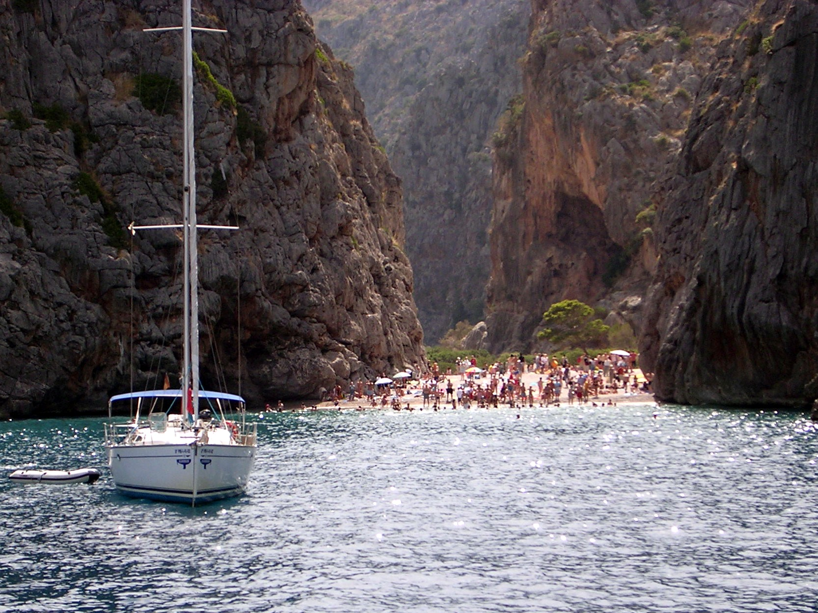 Torrent de Pareis, Escorca, Mallorca, Spain